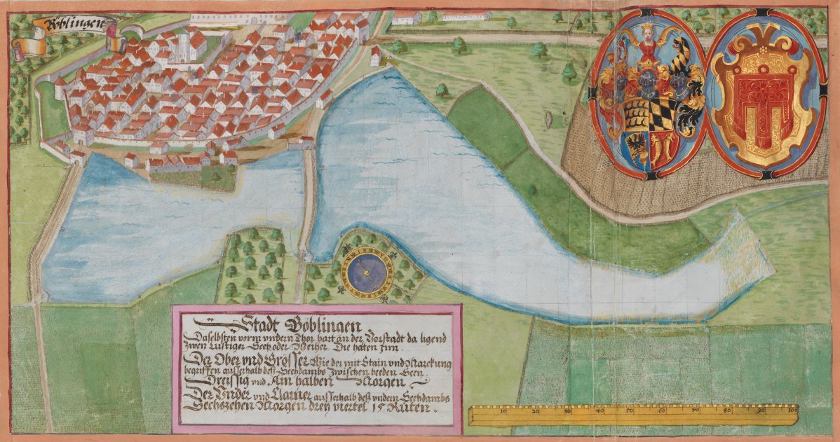 Seehbuch, darinnen alle Seeh und Weyher in dem löplichen Hertzogthumb Würtemberg. Stuttgart (?), Anfang 17. Jh.; Württembergische Landesbibliothek Stuttgart, Cod. hist. fol. 261, fol. 4r, Detail: Böblingen